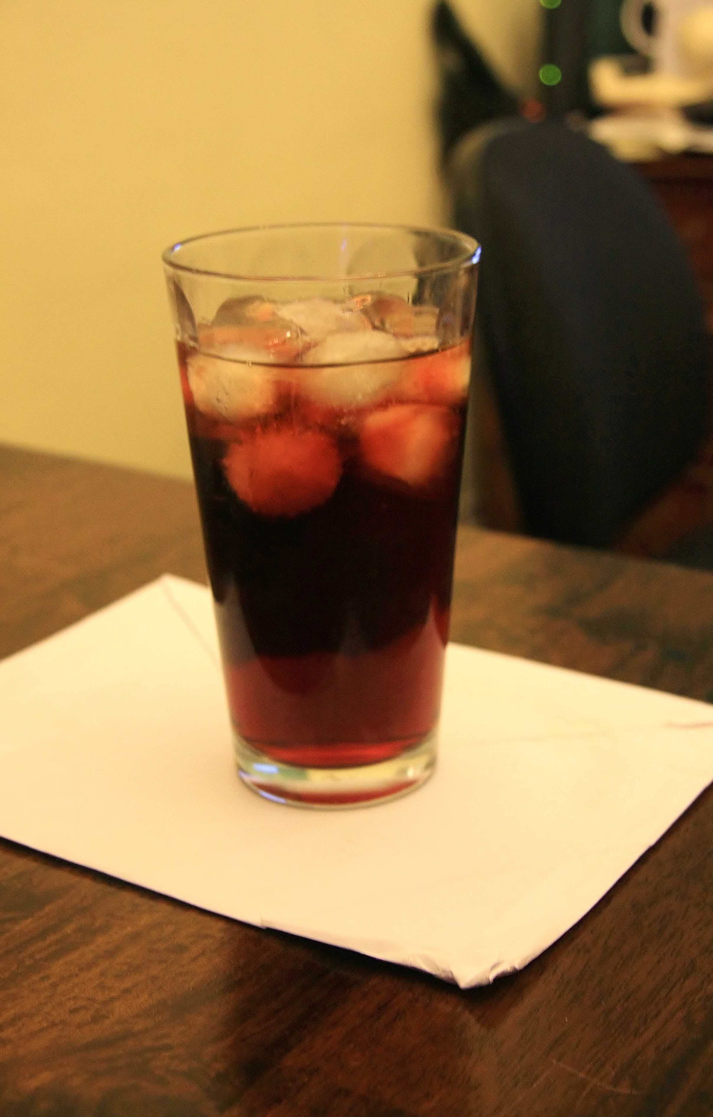 Picon Punch